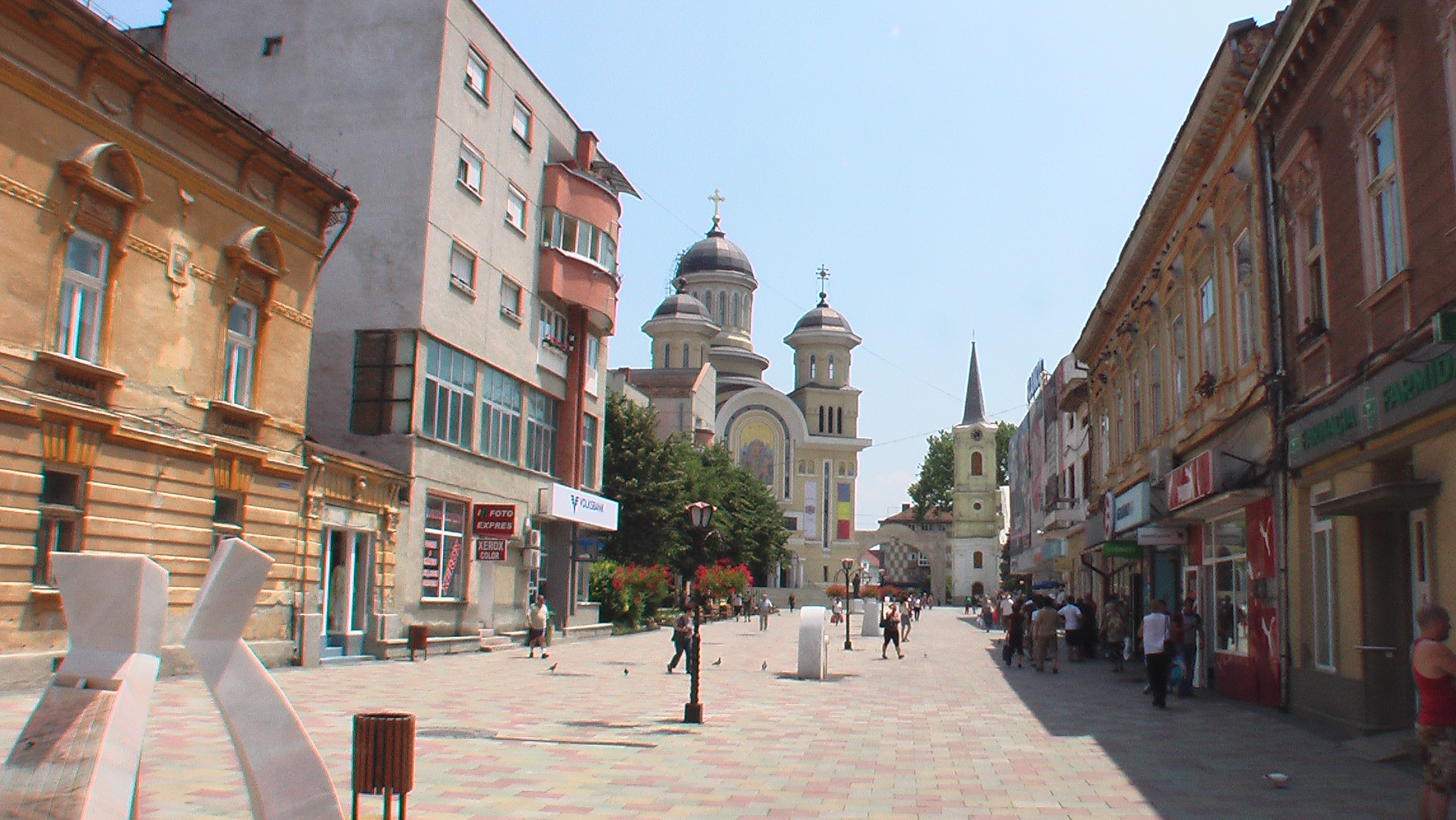 Caransebes1